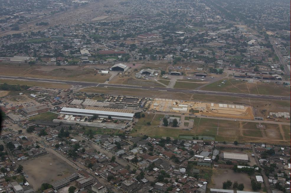 Vue aérienne du camp de N'DOLO bati par l'élément génie EUFOR RDC